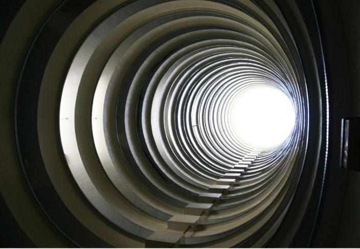 大坑勵德邨藝術攝影